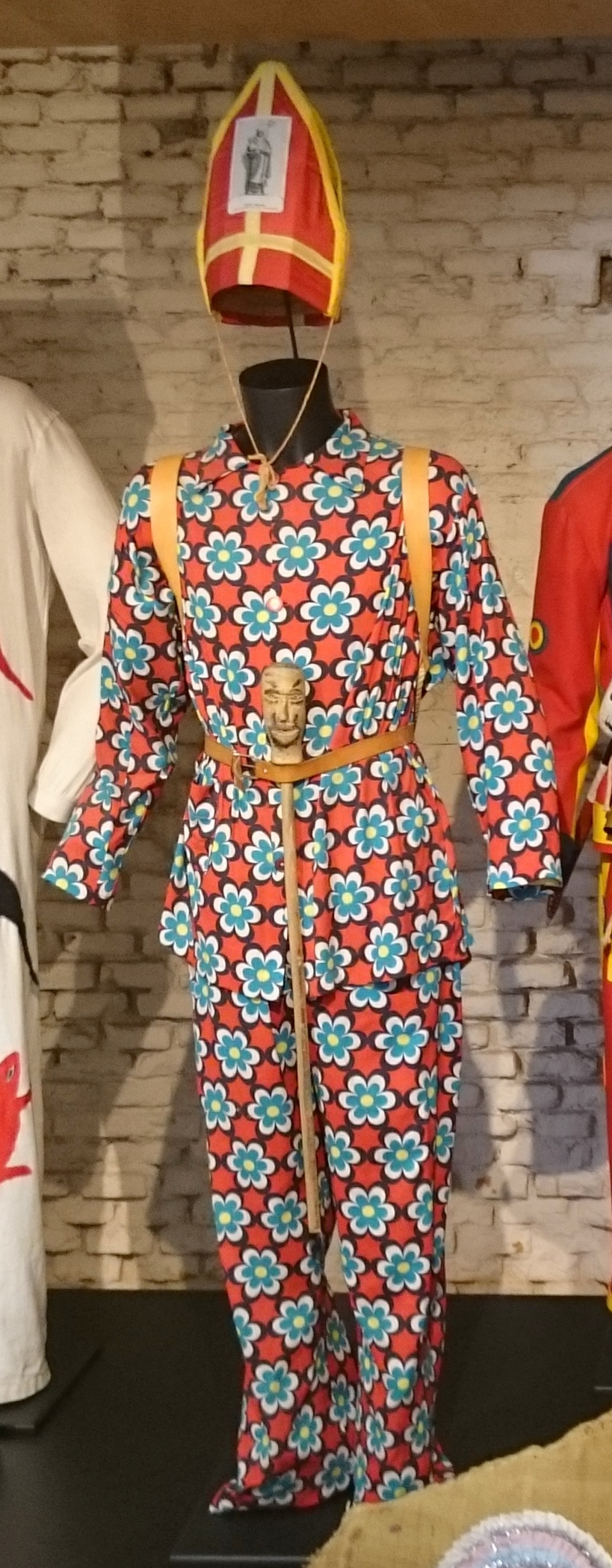 Traje de Dimoni de la Santantonà (Forcall, Castellón) This is a photography of a Folklore festival in Spain (Wikidata id Q5963246).